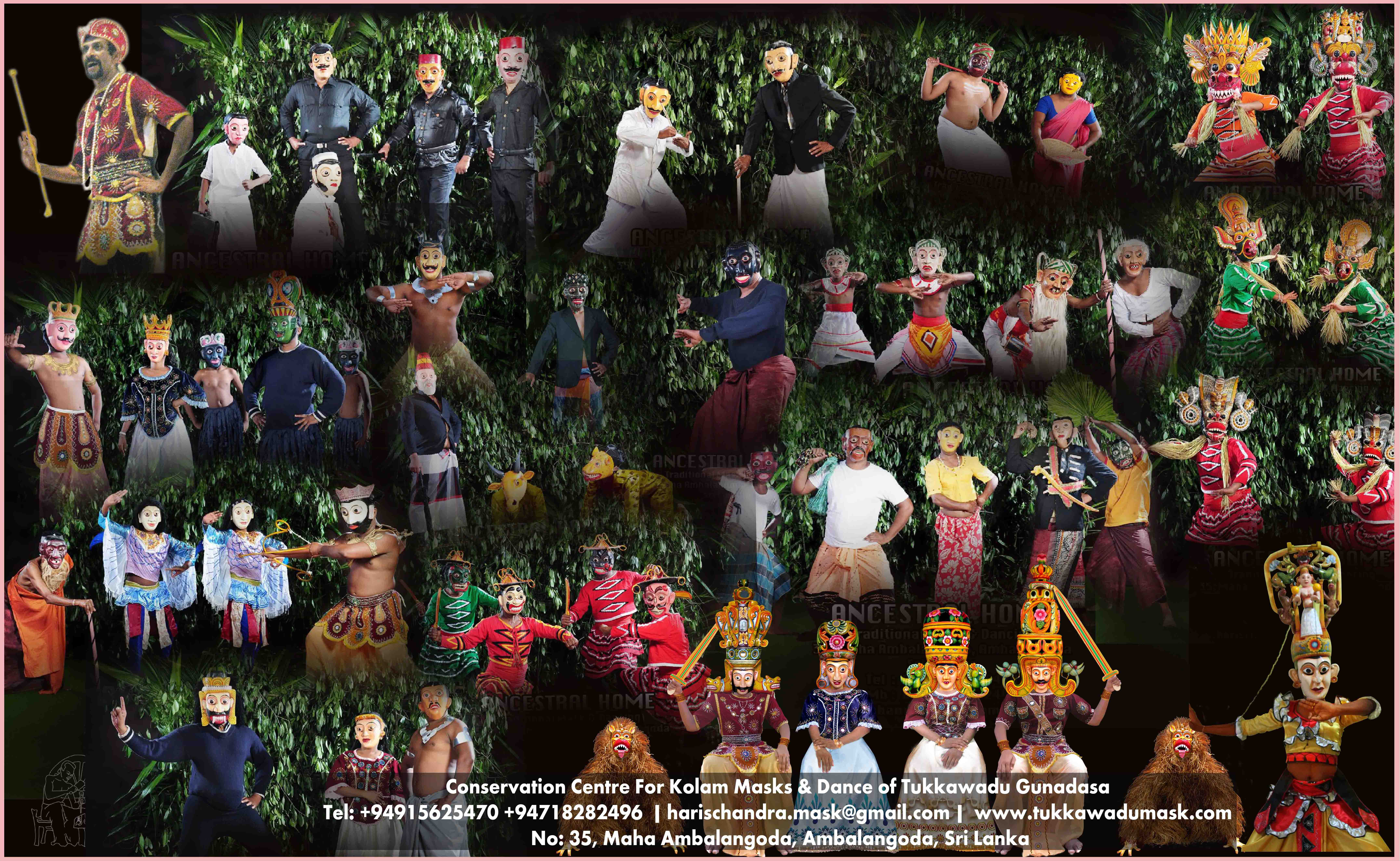 සිංහල: අම්බලන්ගොඩ ටුක්කාවඩු පරපුරේ කෝලම් නැටුම් අංගයන්